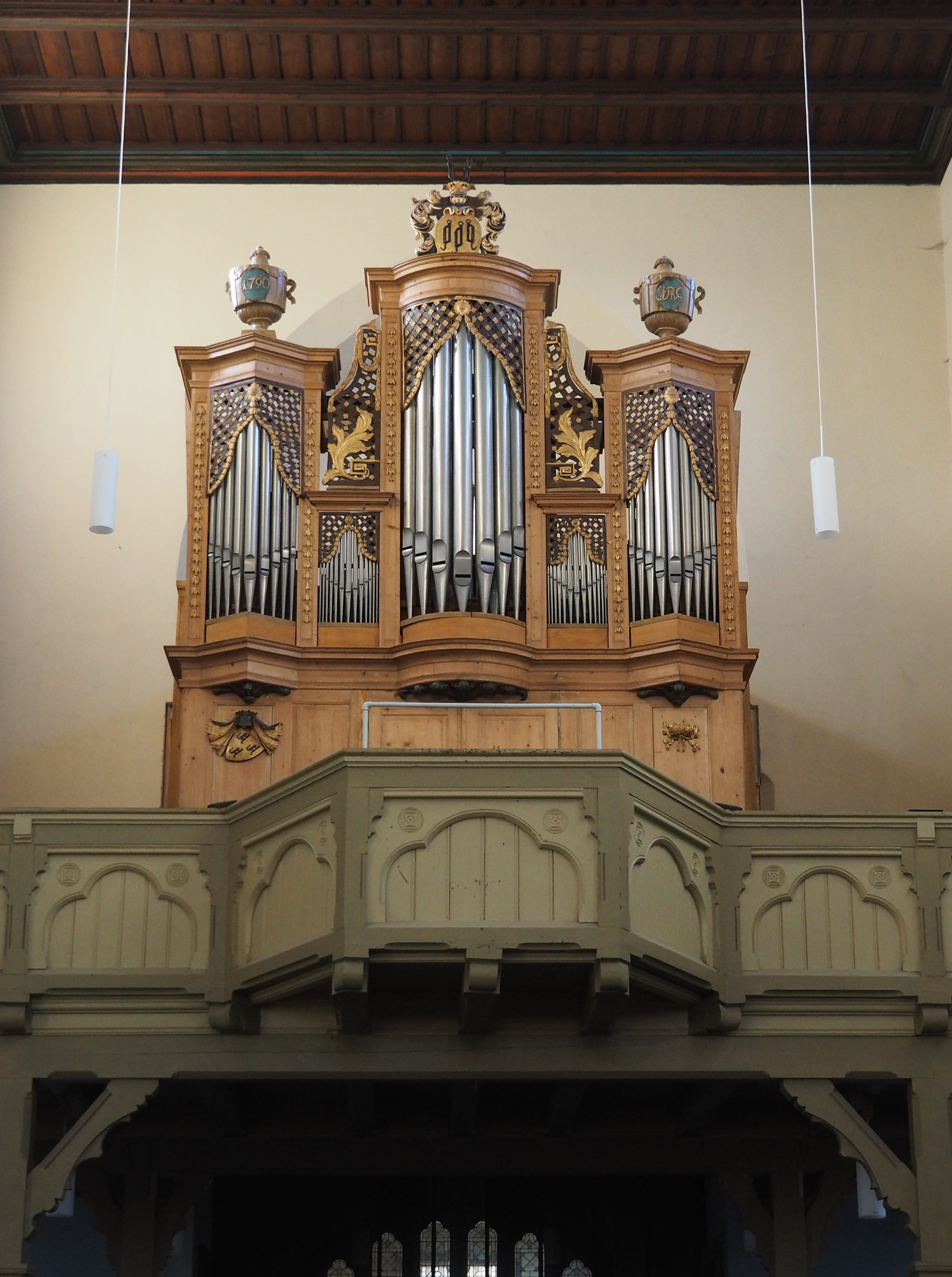 Orgel in der St. Sylvestri-Kirche, Wernigerode. 1790 erbaut von Georg Christoph Jesse aus Halberstadt, 1971/1972 restauriert. 1383 Pfeifen, 2 Manuale, Pedal und 26 spielbare Register.